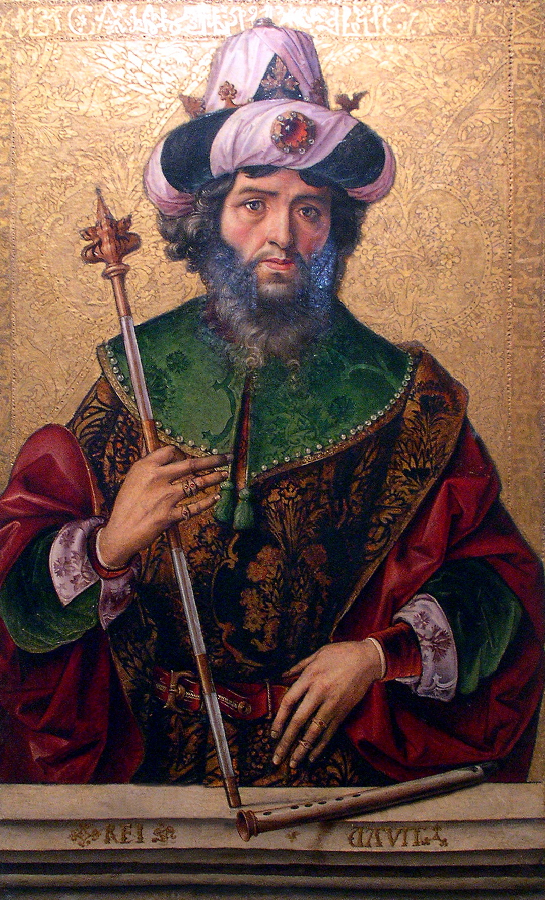 David